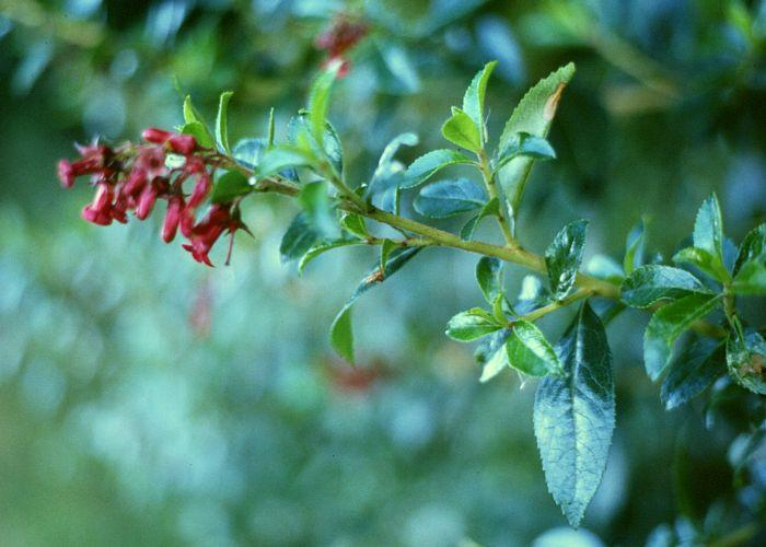 Escallonia rubra, Escalloniaceae - Chile, nahe dem Südufer des Sees Lago Llanquihue/cerca de orilla del sur del Lago Llanquihue/close to the southern shore of the lake Lago Llanquihue, ca. 13 km W Ensenada (Prov. de Llanquihue)